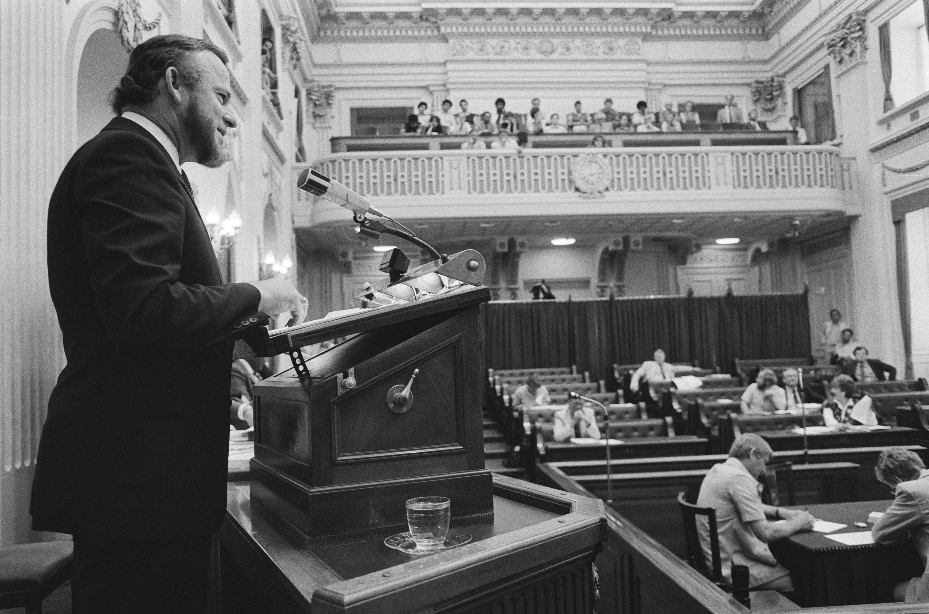 Collectie / Archief : Fotocollectie Anefo Reportage / Serie : [ onbekend ] Beschrijving : Tweede Kamer , wijziging Kon. Statuut ivm uittreding Aruba uit Nederlandse Antillen ; Betico Croes achter spreekgestoelte in de Kamer Datum : 3 juni 1985 Locatie : Aruba, Nederlandse Antillen Trefwoorden : politiek Persoonsnaam : Croes Betico Instellingsnaam : Tweede Kamer Fotograaf : Croes, Rob C. / Anefo Auteursrechthebbende : Nationaal Archief Materiaalsoort : Negatief (zwart/wit) Nummer archiefinventaris : bekijk toegang 2.24.01.05 Bestanddeelnummer : 933-3433